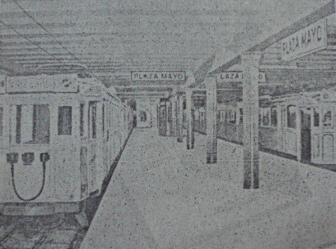 Una panorámica de la estación del subterráneo de Buenos Aires Plaza de Mayo ("Plaza Mayo" según los carteles originales) en su inauguración el 1º de diciembre de 1913 por la Compañía de Tranvías Anglo-Argentina (CTAA)